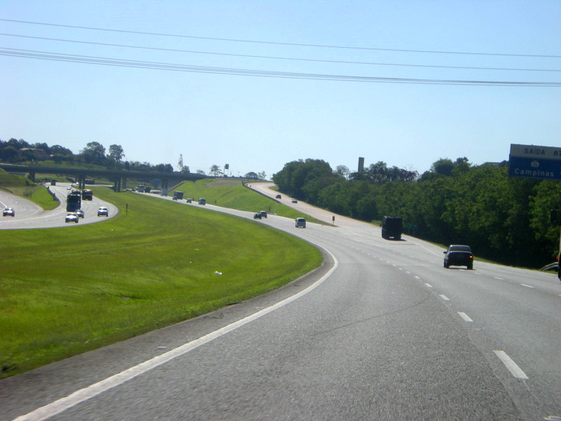 Rodovia dos Bandeirantes, sentido Capital-Interior do Estado de São Paulo, na altura do trecho de Campinas.